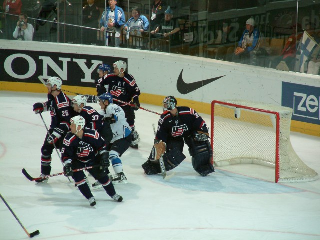 Spiel USA-Finnland bei der WM 2005